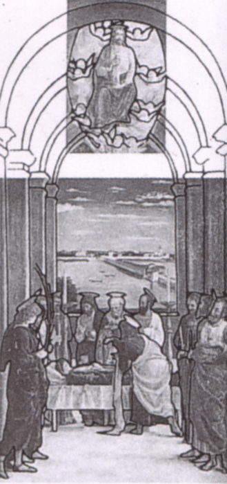 Mantegna, grafico con ricostruzione della pala della morte della vergine